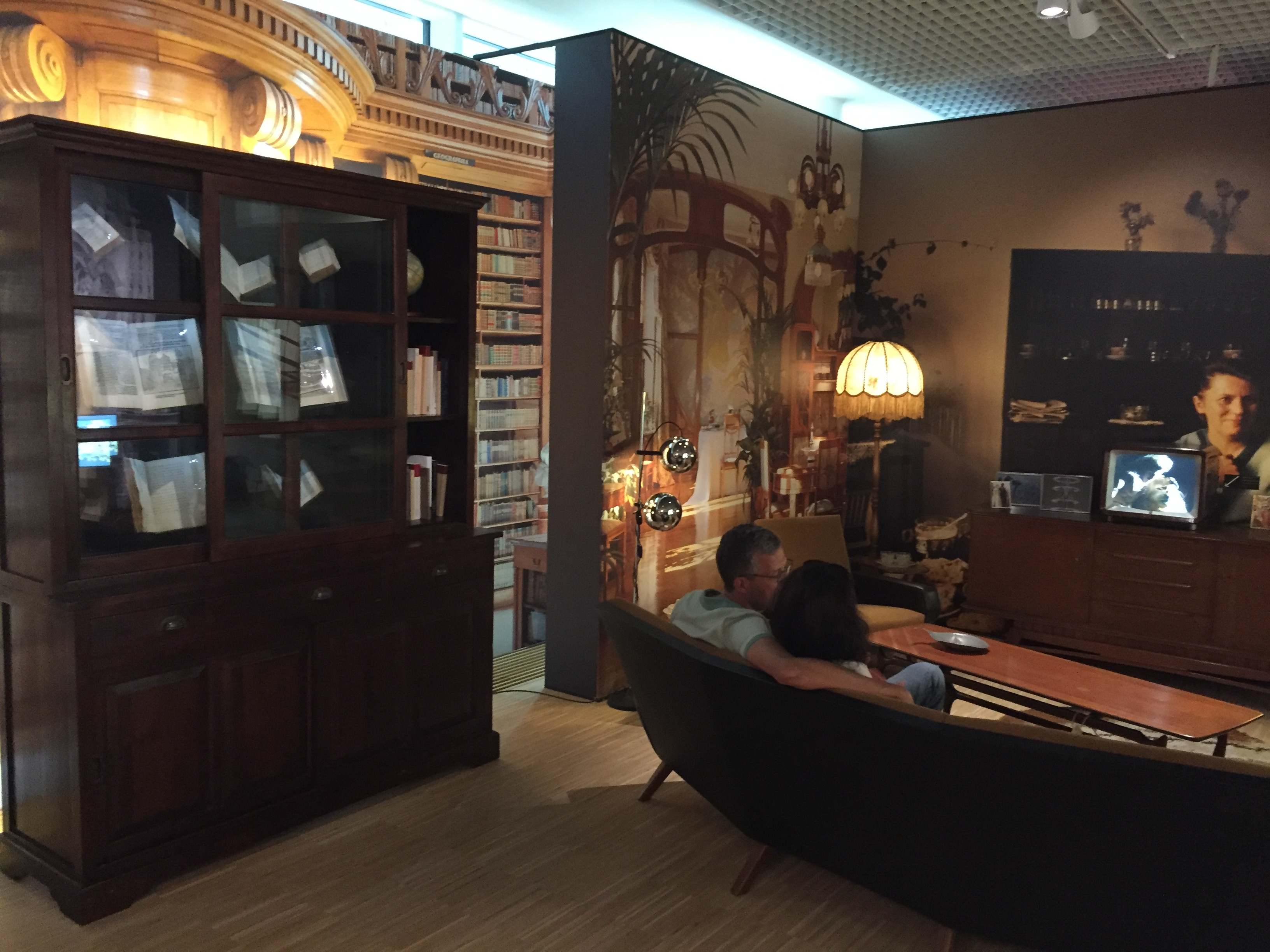 Exposición temporal de la Casa de la Historia Europea en Bruselas.